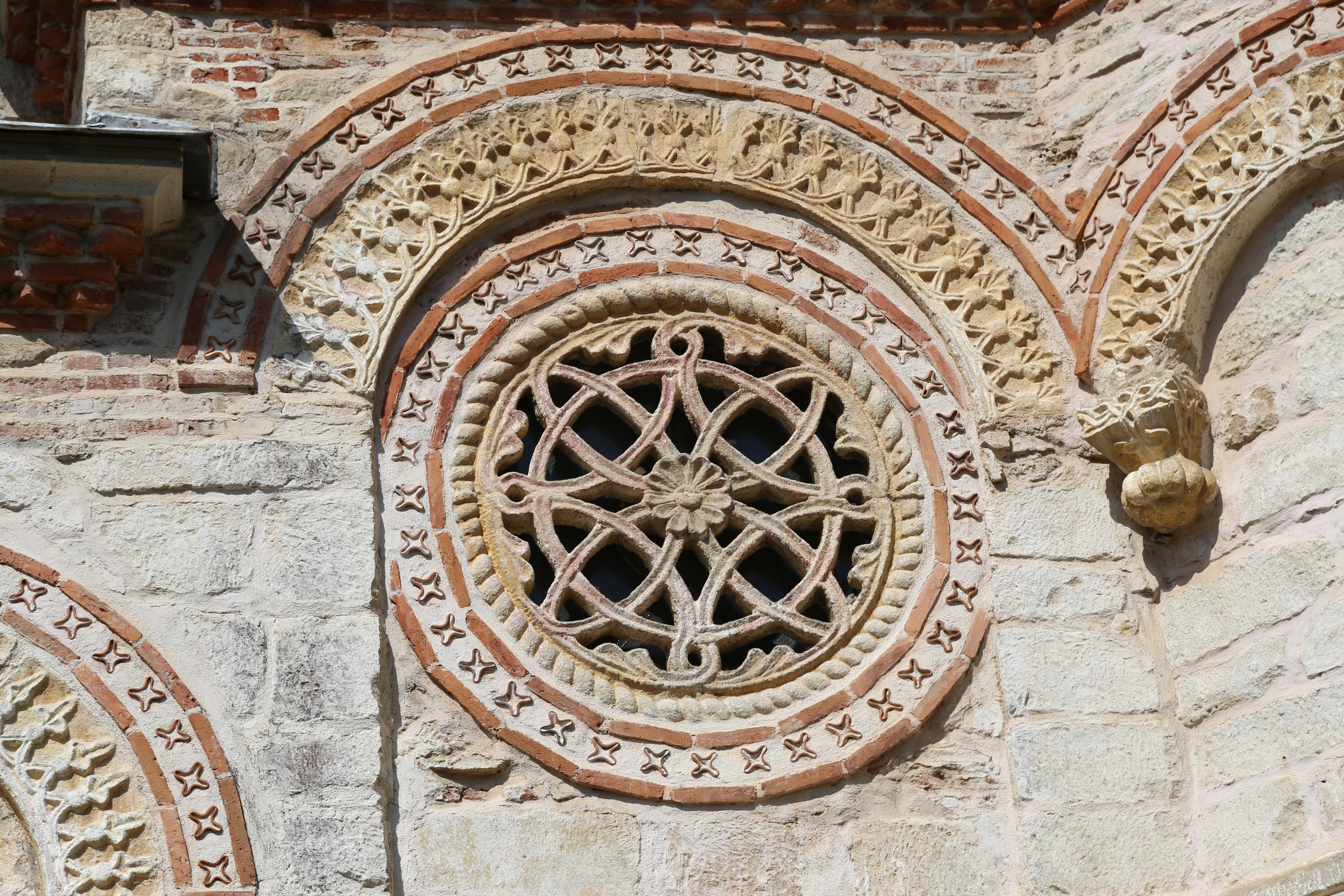 Rozeta od belovodskog peščara, manastir Ljubostinja